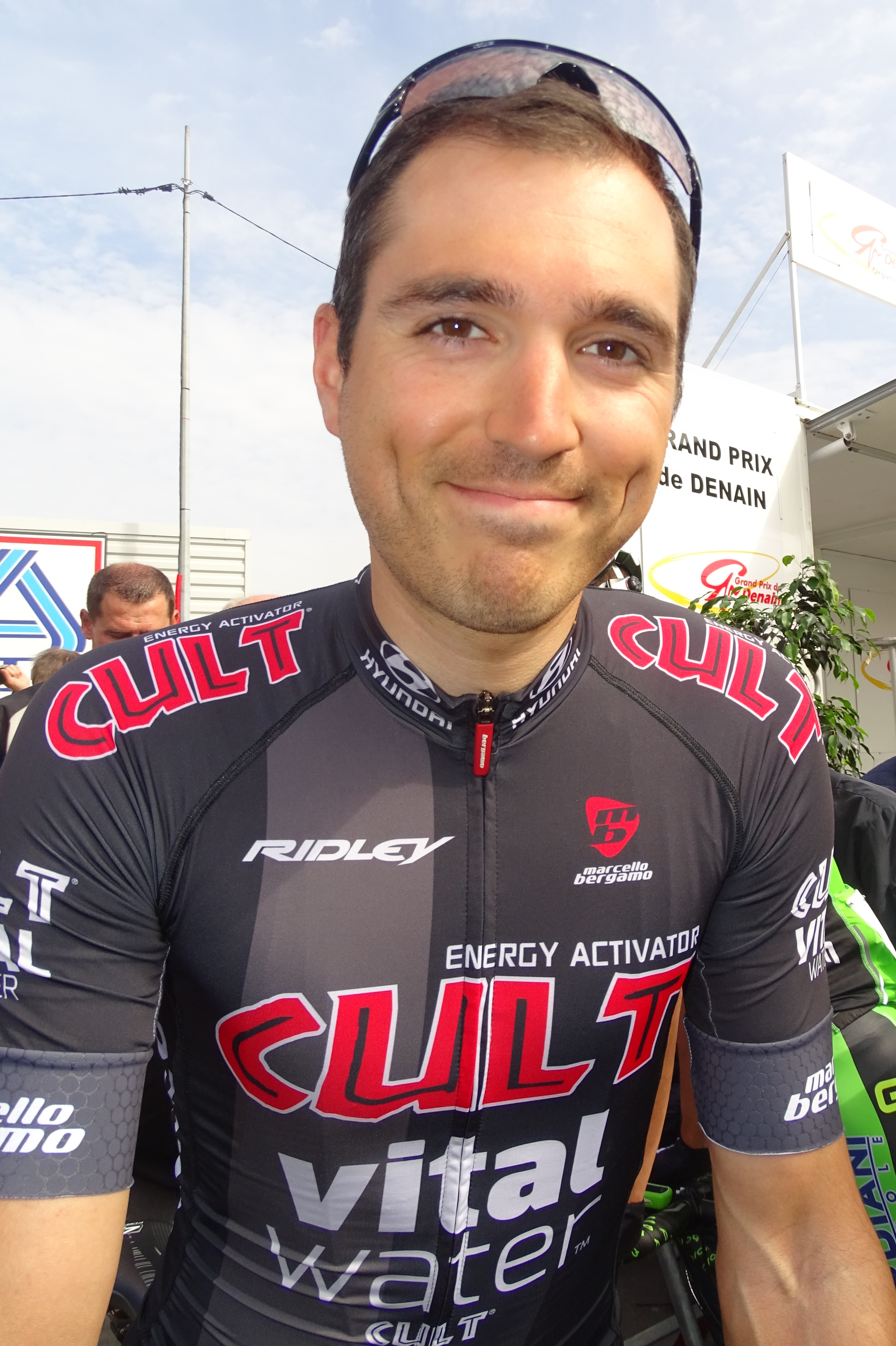 Reportage réalisé le jeudi 16 avril à l'occasion du départ et de l'arrivée du Grand Prix de Denain 2015 à Denain, Nord, Nord-Pas-de-Calais, France.